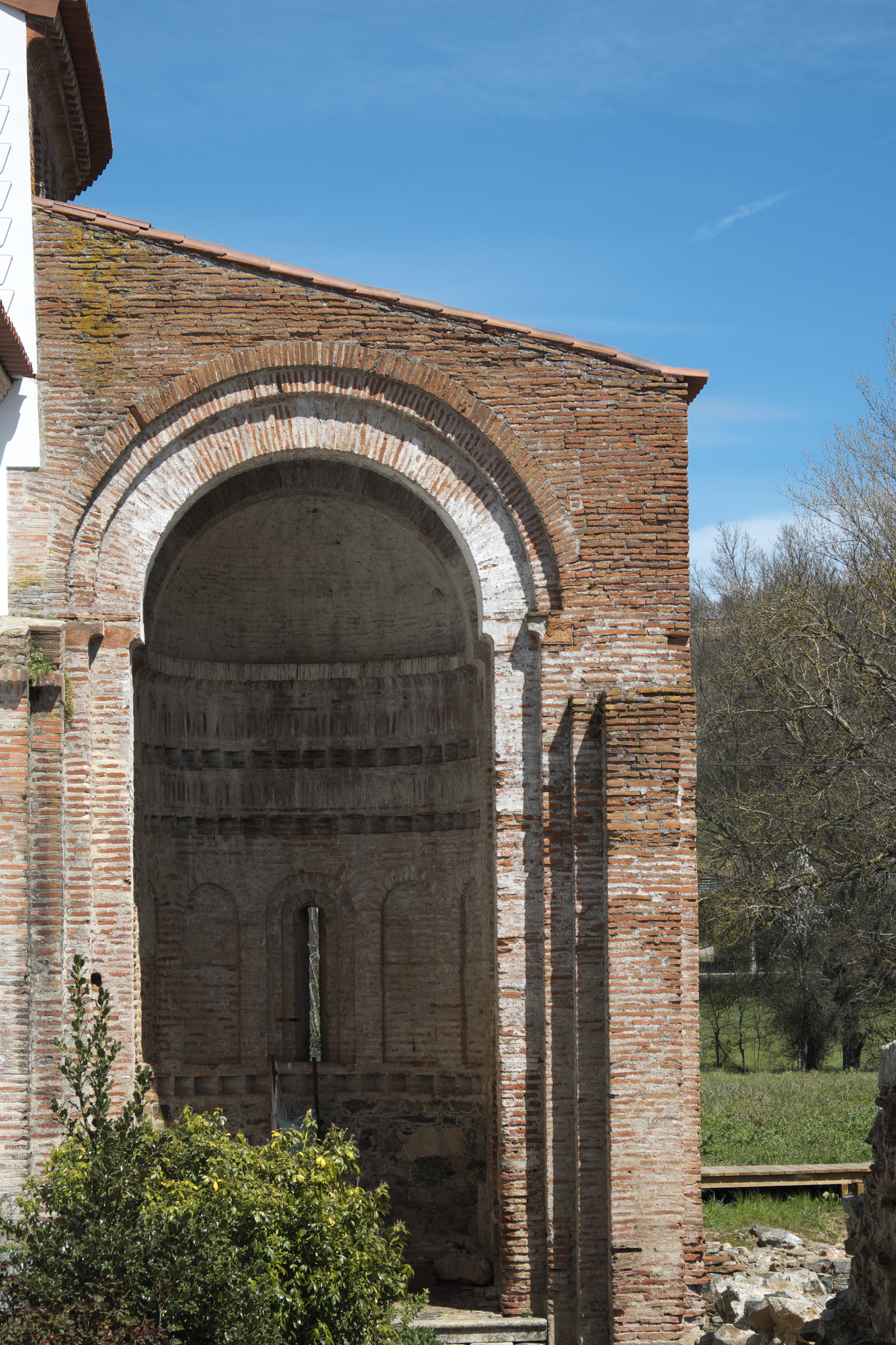 Ehemalige Benediktinerabteikirche in Castro de Avelãs, einer Freguesia von Bragança in der Região Norte (Portugal)